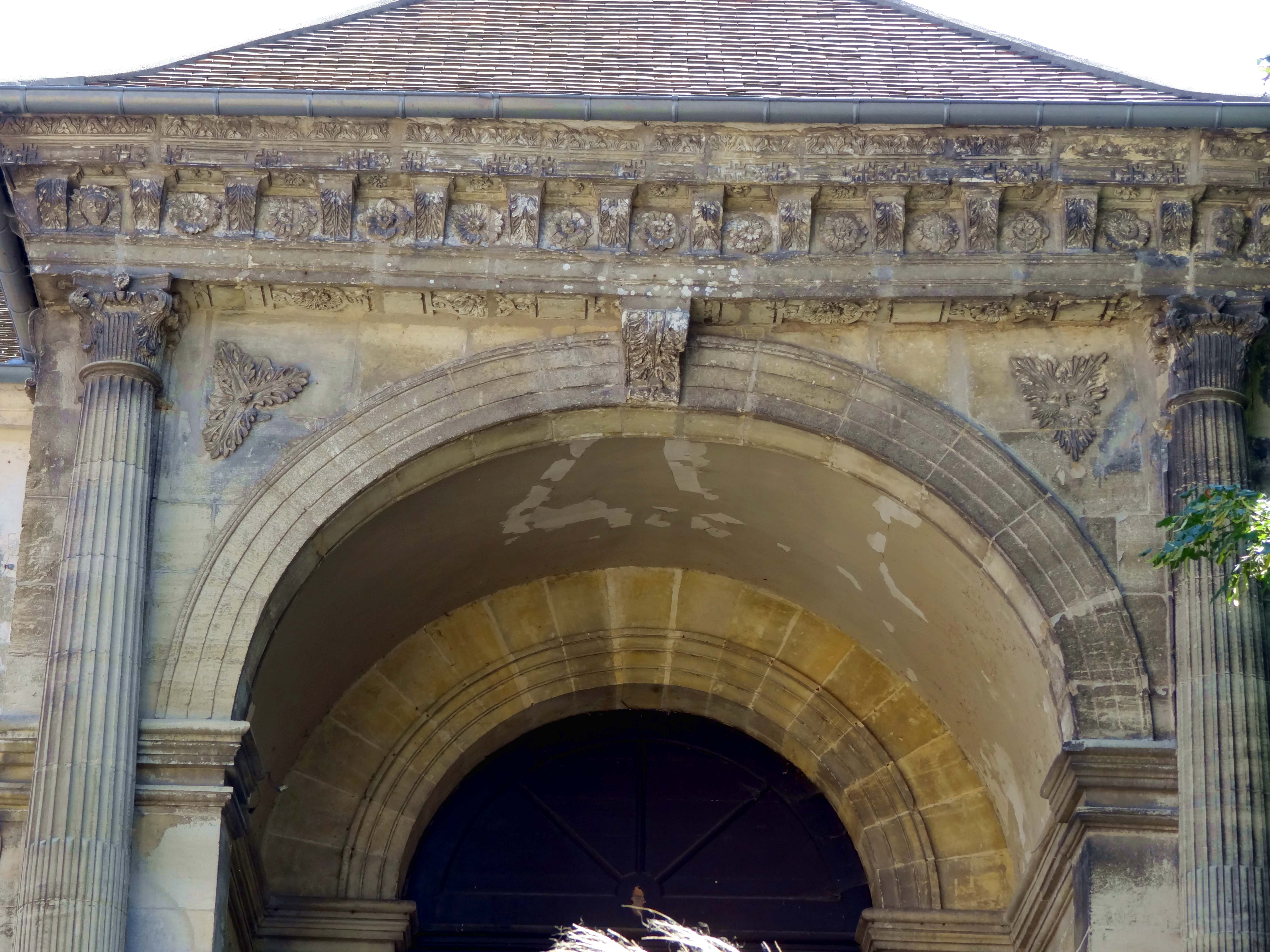 Église Notre-Dame-de-l'Assomption d'Évecquemont - voir titre.